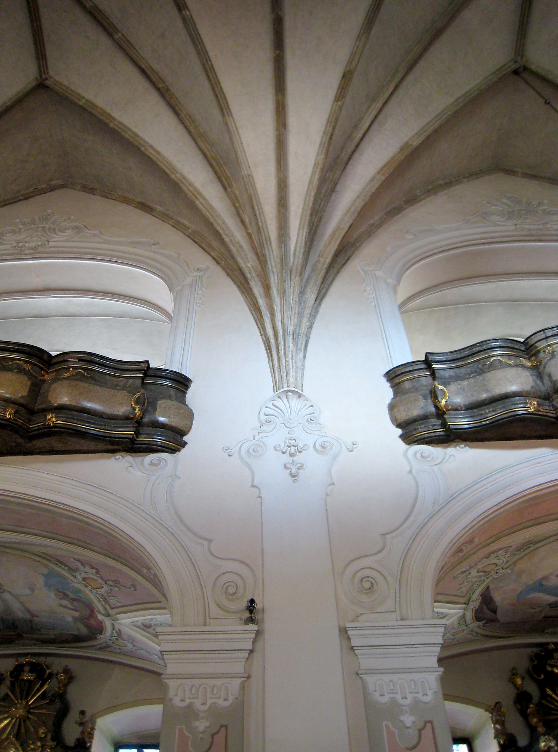 Hartberg Pfk, Innenraum